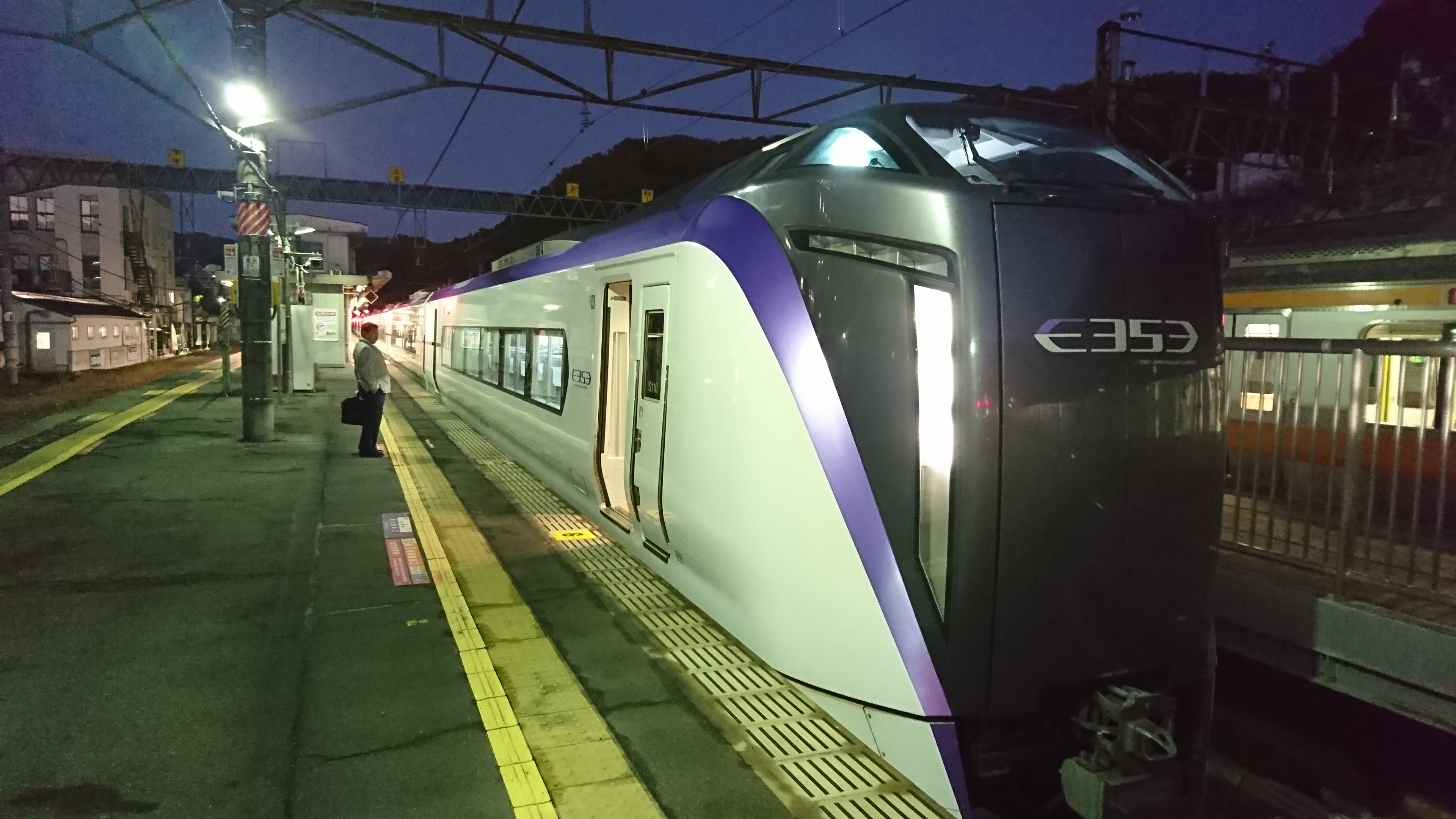 Ome limited express von aussen in Ome Bahnhof